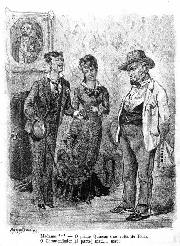 Caricatura em O Besouro, vol. 1, nº 2, 1878, p. 9